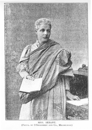 Annie Besant (1847-1933) im Jahr 1895